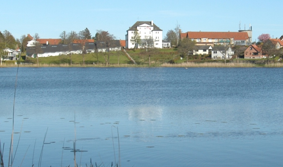 Hotel Bretagne set fra Hornbæk Sø.